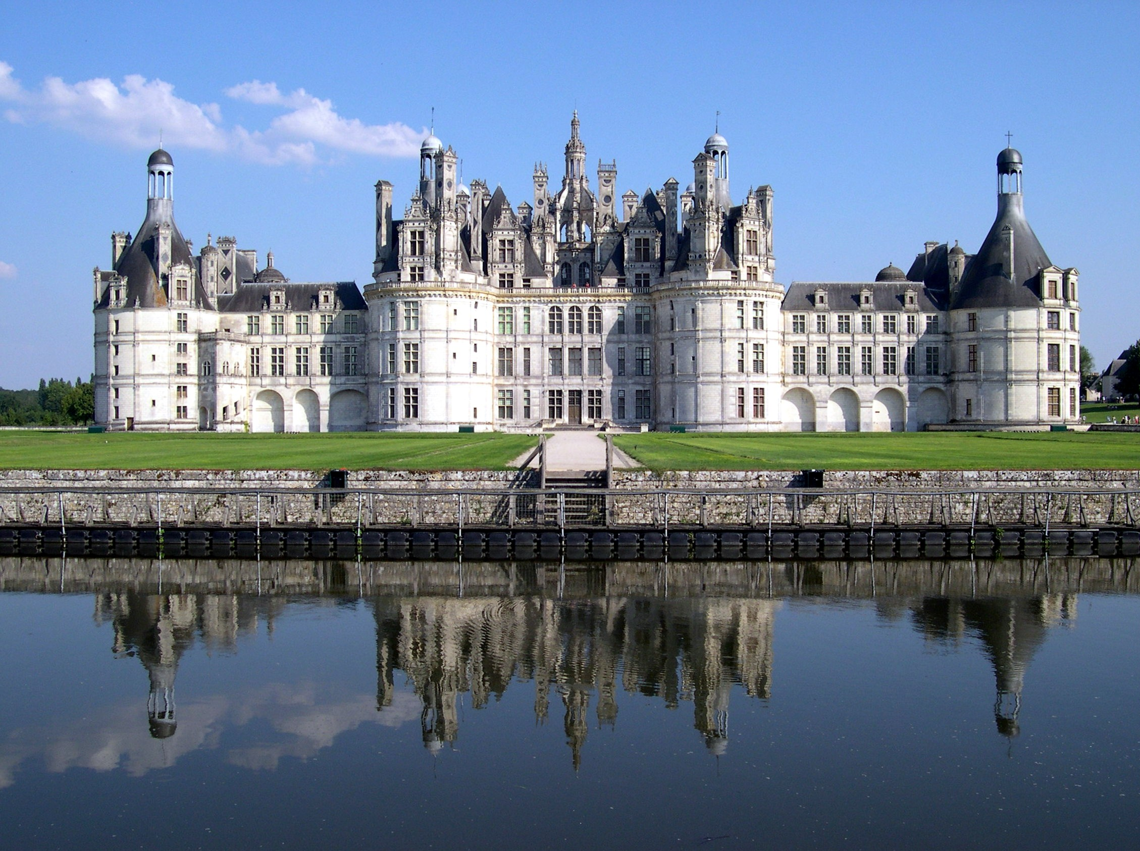 France Loir-et-Cher Château de Chambord Photographie prise par GIRAUD Patrick